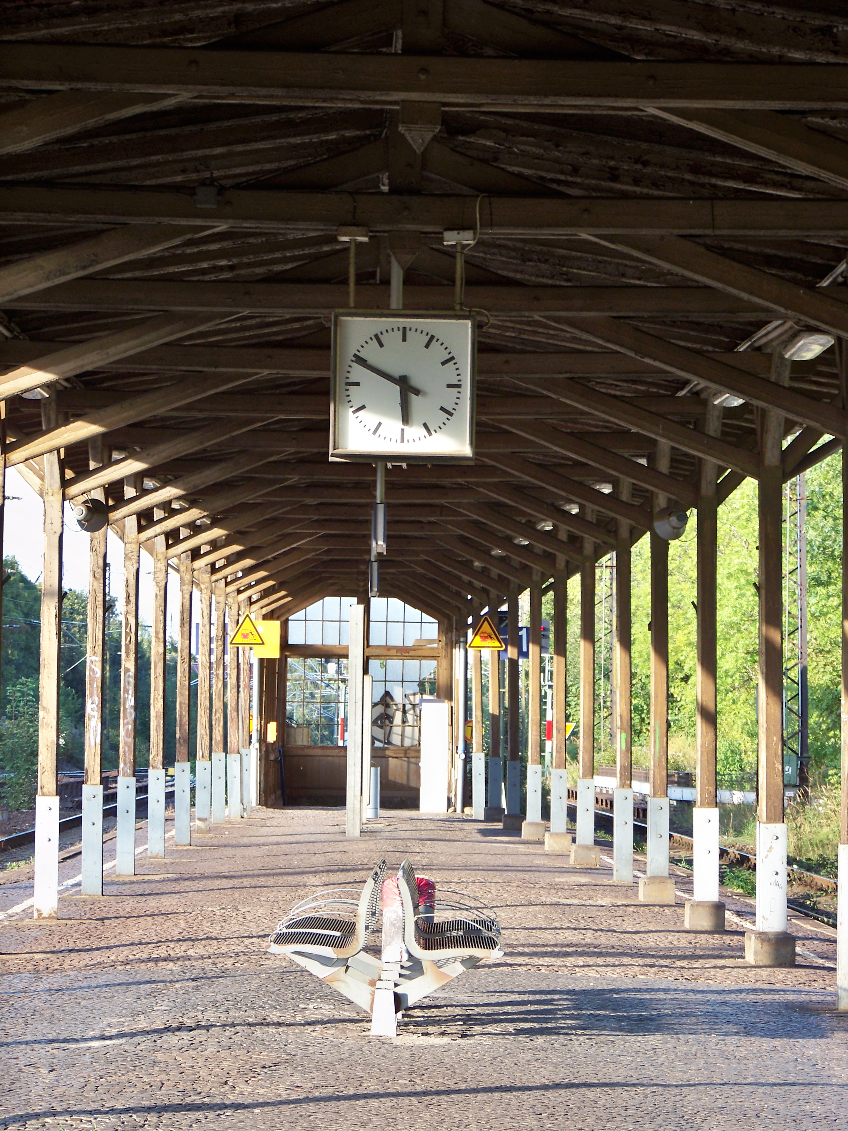 Bahnsteig des Bahnhofs Leipzig Stötteritz